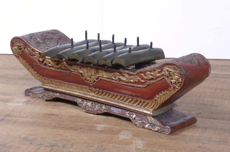 Slaginstrument. Het houtsnijwerk (ukiram) van de onderstellen is gemaakt in de beroemde Djajadipuram volgens aanwijzingen van het toenmalige hoofd. De versieringsmotieven vertonen een melange van 19e eeuwse Biedermeyermotieven (de plantenbak op de gender, de barung en de gambang, het bladermotief) en authentieke Javaanse ornamenten. De gamelan is afkomstig uit de kapatihan van Jogjakarta, waar deze in de tweede helft van de negentiende eeuw werd vervaardigd in opdracht van de regerende patih (eerste minister van het sultanaat Ngajogyaningrat), prins G.P.H. Hadiloesoemo. Deze gamelan werd als losse slendro-gamelan voor het privégebruik van deze patih gebouwd. Er hoort naar alle waarschijnlijkheid geen pelog-helft bij. Er zijn meer gevallen bekend van dergelijke slendro-gamelans uit de Jogja'se kapatihan. De slenthems maakten oorspronkelijk geen deel uit van deze gamelan, evenmin als de onversierde gender barung, die qua klank gewoon een overbodige verdubbeling is van de wél versierde gender barung. . Metallofoon met zes toetsen, onderdeel van gamelan Slendro Unknown language: Saron peking Saron panerus